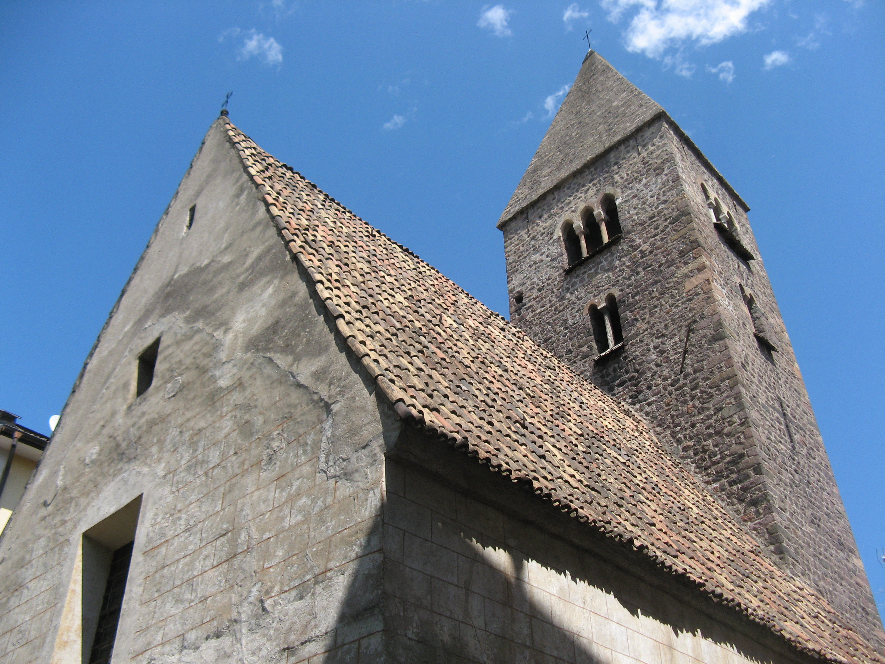 St. Johann im Dorf, Bozen